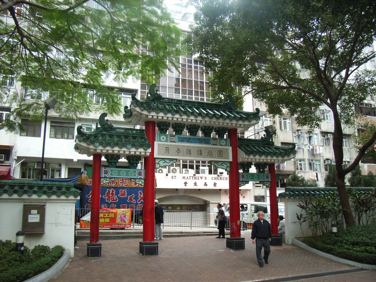 荷李活道公園近zh:水坑口街, 港島zh:巴士26號zh:荷李活道西行第個車站下車zh:中西區zh:普仁街街口附近 Hollywood Road, Sheung Wan, Hong Kong